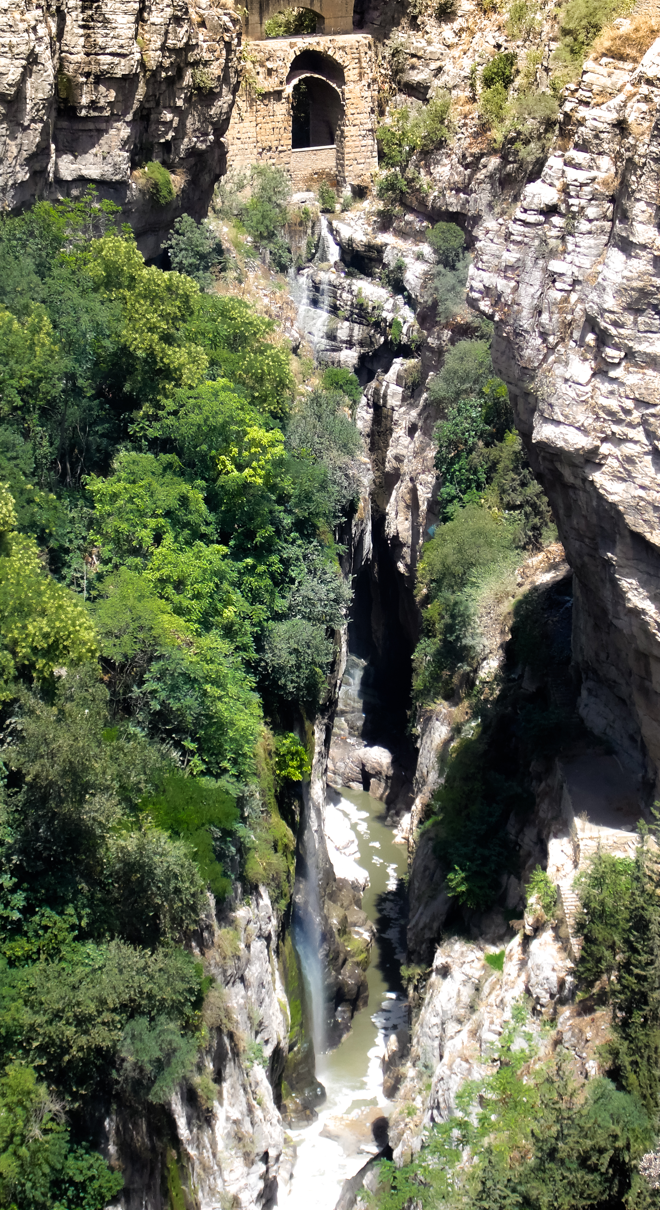 Sur cette photo vous pouvez voir les gorges et l'oued rhumel de la ville de Constantine, on peut apercevoir une chute d'eau emanant de sources naturelles qui jaillissent du rocher, les gorges sont classees patrimoine naturel en 1968, au fond vous pouvez apercevoir le pont romain d'Antonin.